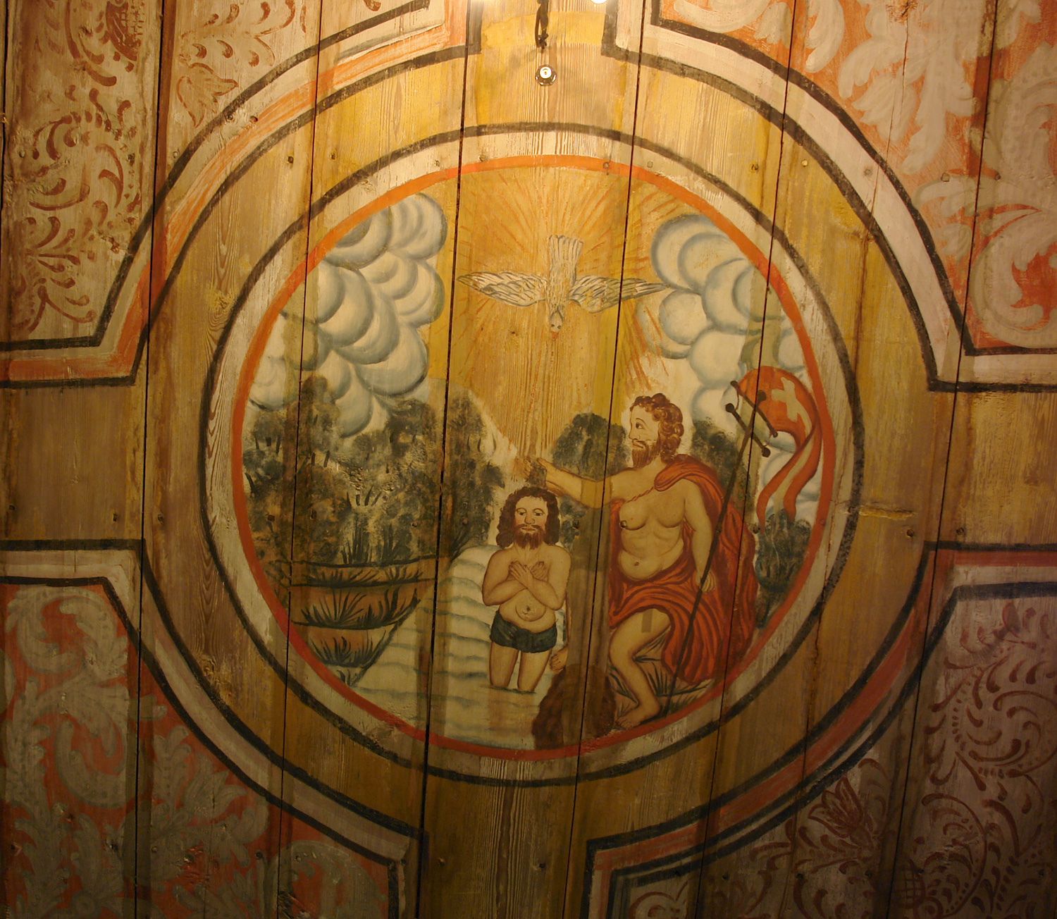 Stabkirche von Hedared: Taufe Jesu auf der Chordecke